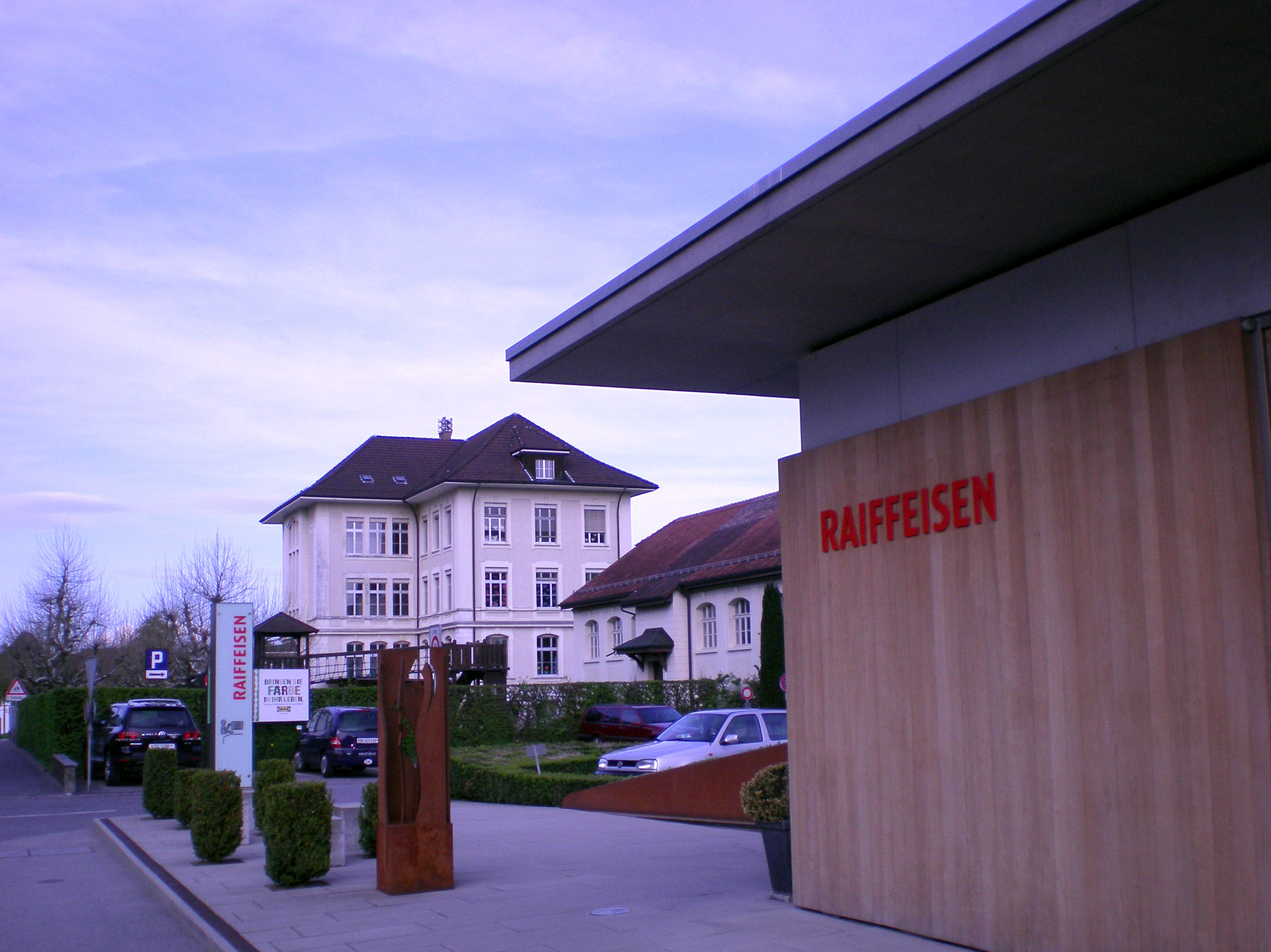 Oberes Schulhaus Primarschulhaus Biberist